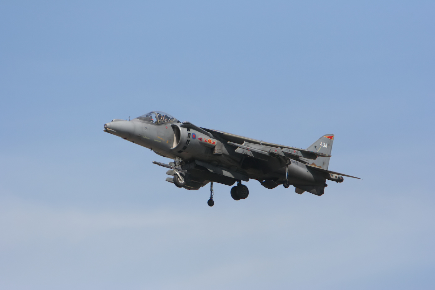 BAe Harrier GR7A/9